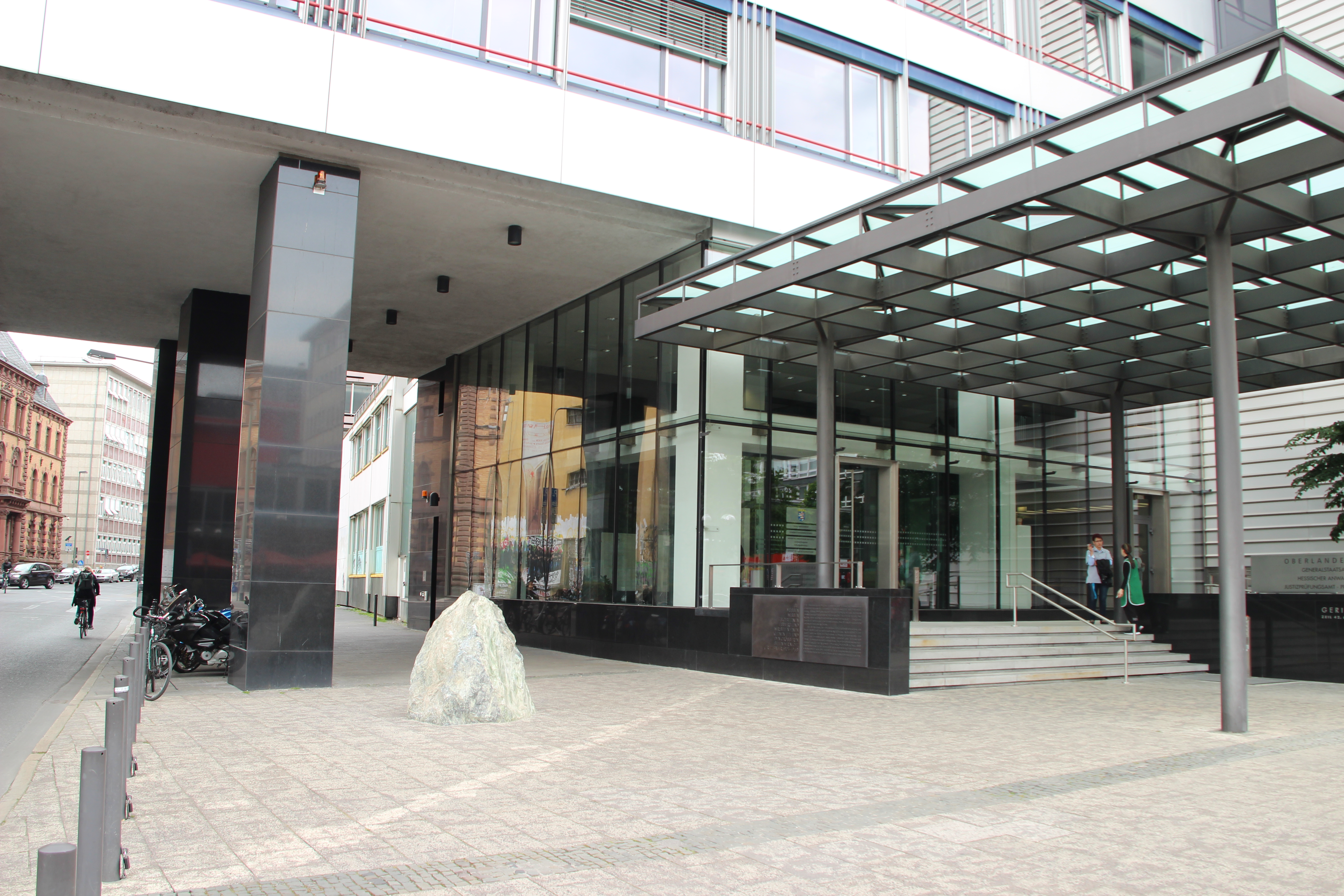 Bildinhalt: Gedenkstein für Fritz Bauer "Nur die Spitze des Eisbergs" vor dem Oberlandesgericht Frankfurt am Main Aufnahmeort: Frankfurt am Main, Deutschland